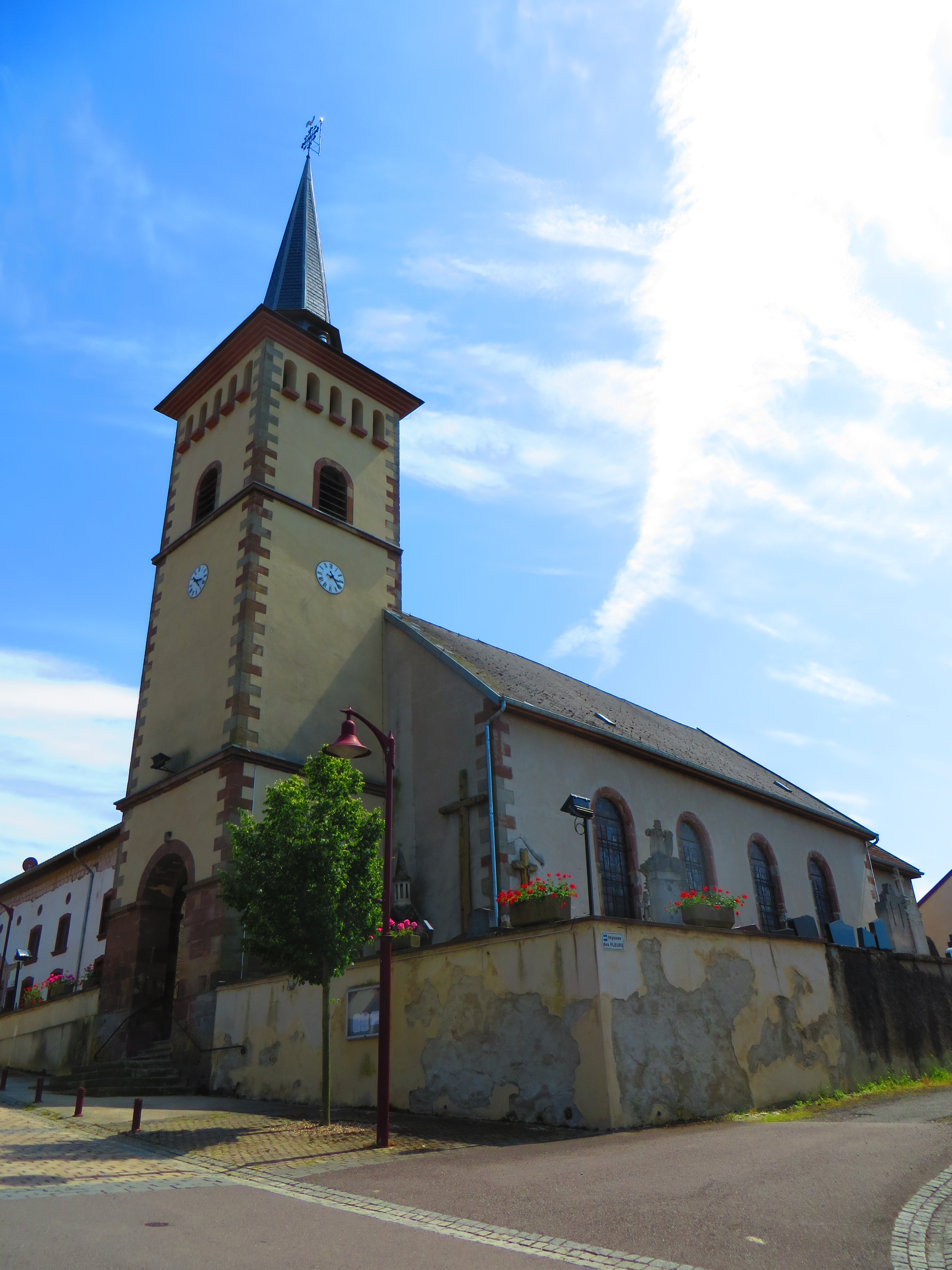 Guerstling eglise